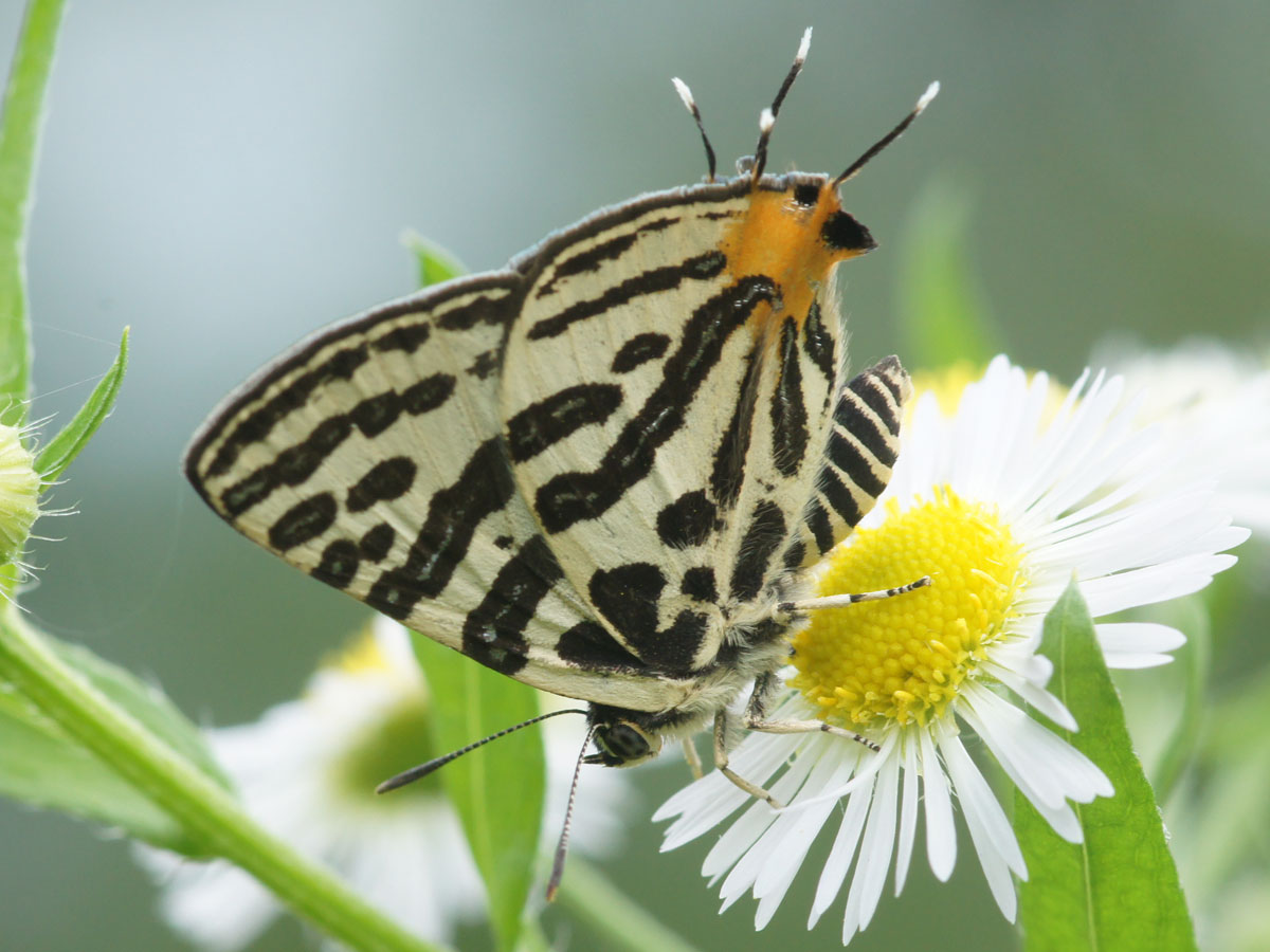 キマダラルリツバメ